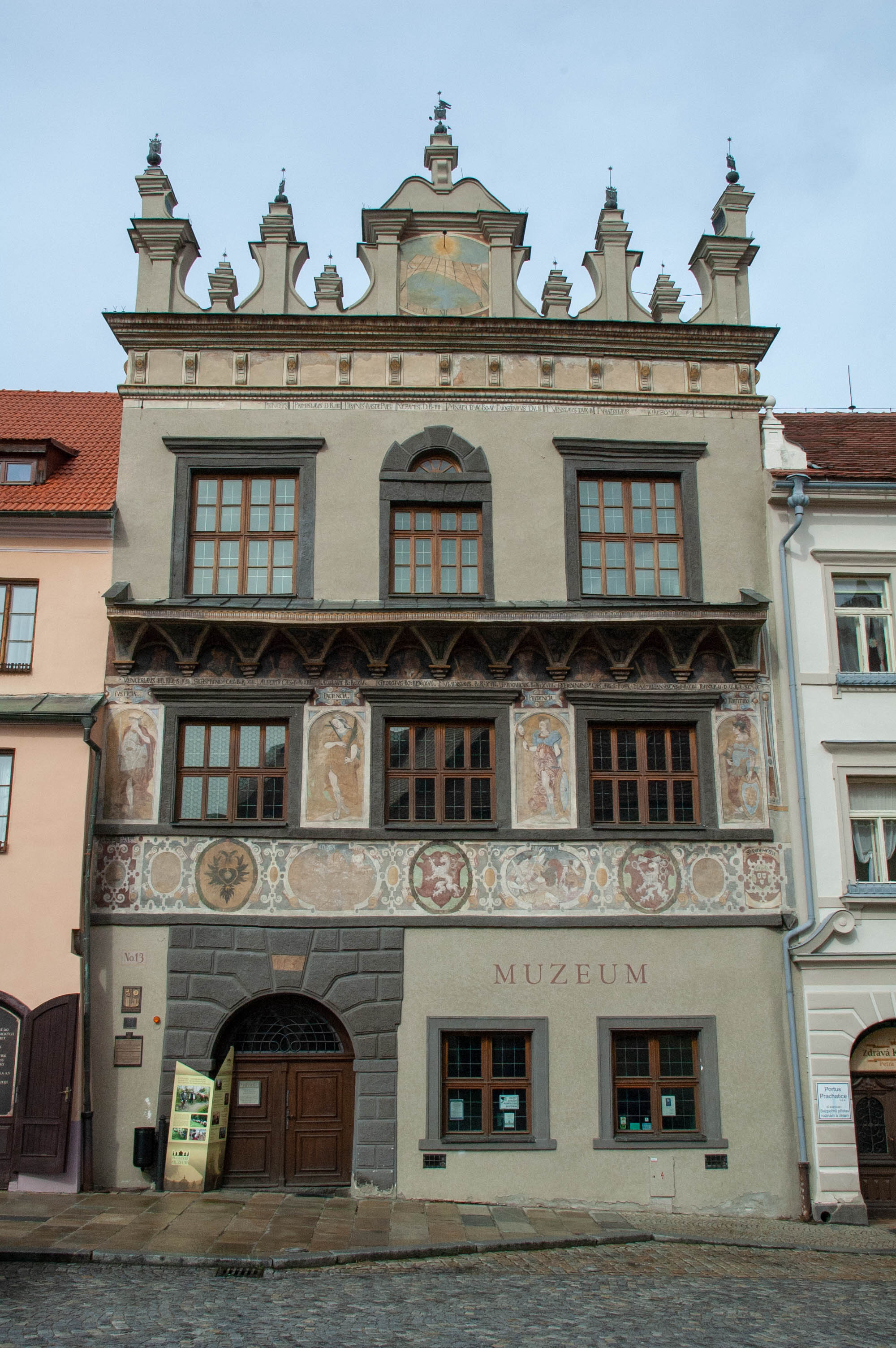 Sitrův dům, Velké náměstí, Prachatice